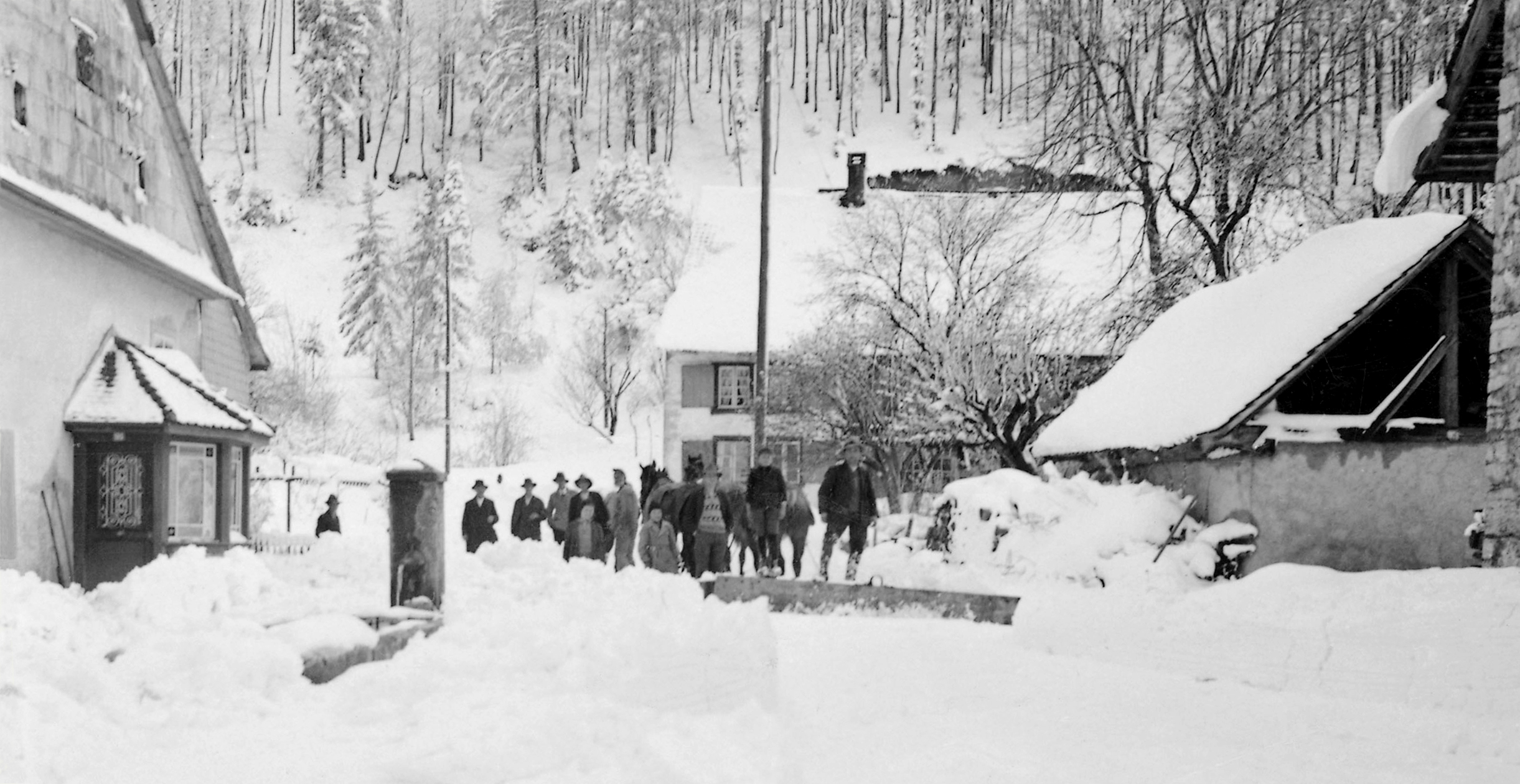 Bärenwiler Dorfbauern beim Schneeschneuzen - Winter 1936